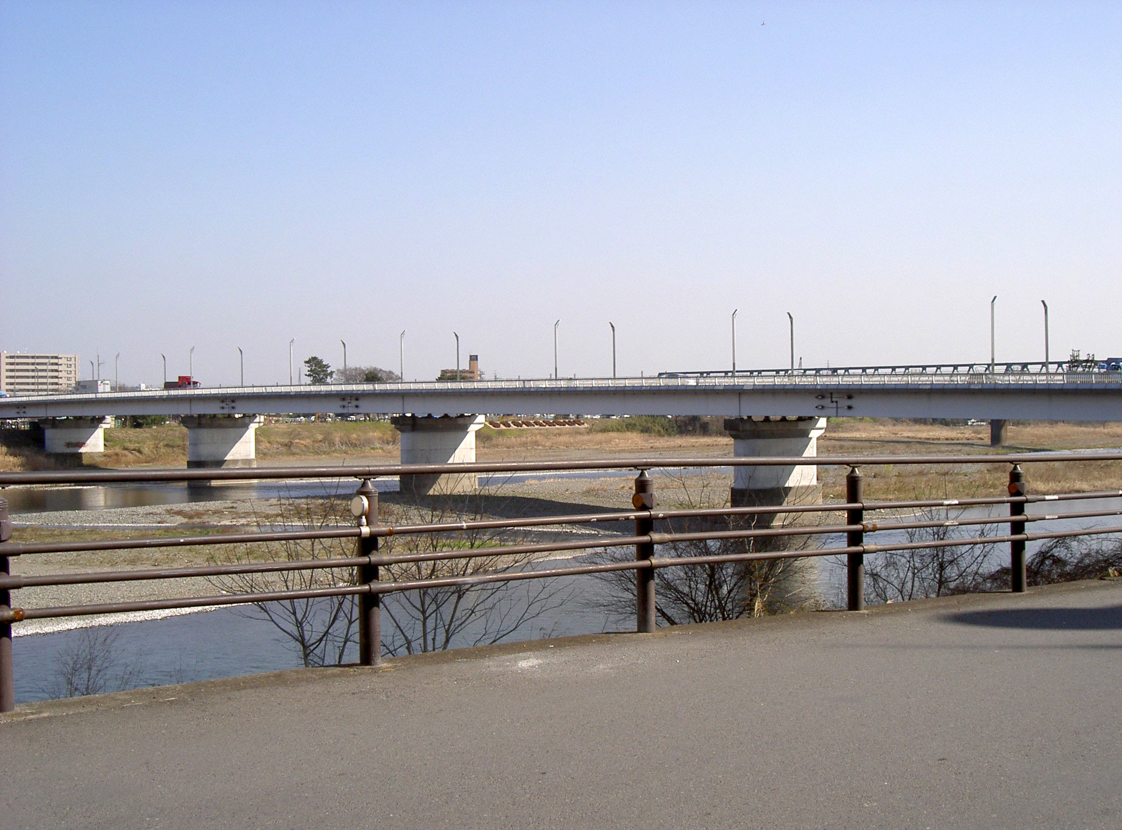 Sagami Ohashi Bridge ja: 相模大橋